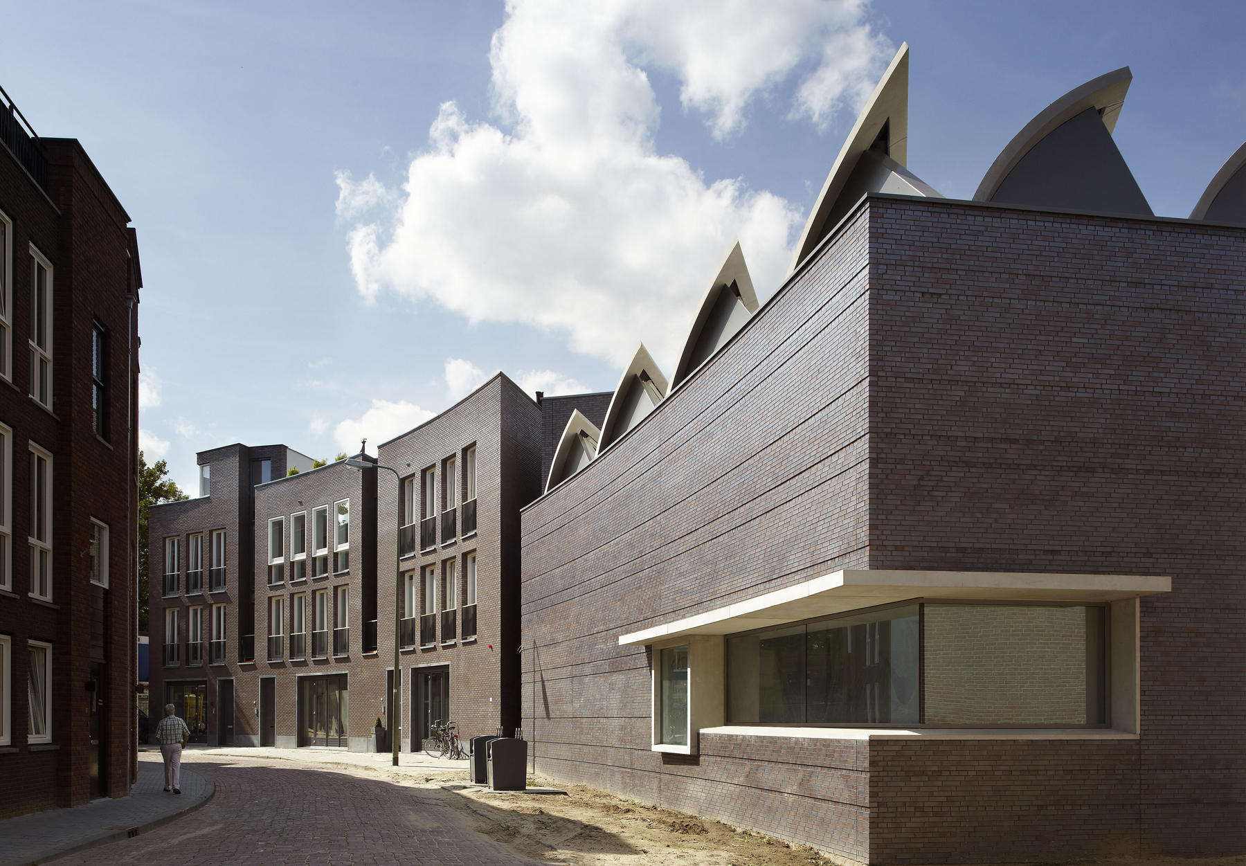 Museumkwartier, Bierman Henket architecten, foto: Joep Jacobs